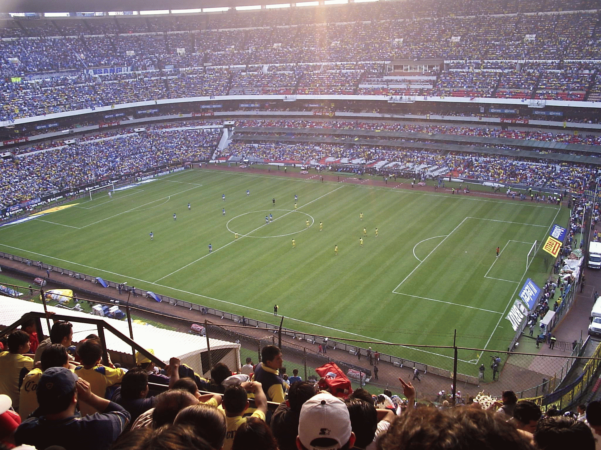 Imagen del partido del Club America vs Cruz Azul en el Estadio Azteca de la Ciudad de México]. Fecha: 6 de noviembre de 2005